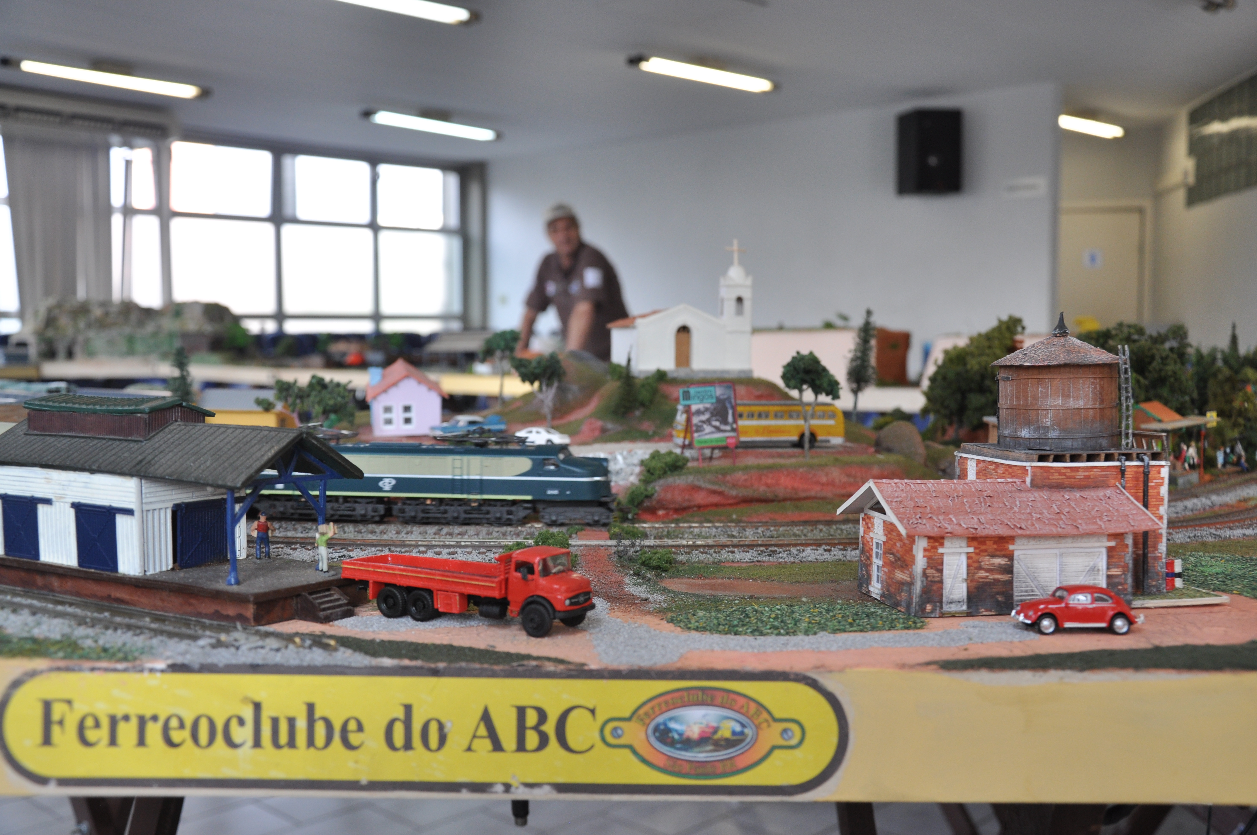 Modulo da Maquete modular do ABC